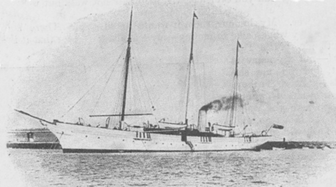 The White Lady. Yate de tres palos con propulsión a vapor.